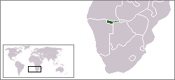 Description:Carte de localisation du bantoustan du Kavangoland, Namibie Auteur:Rémih